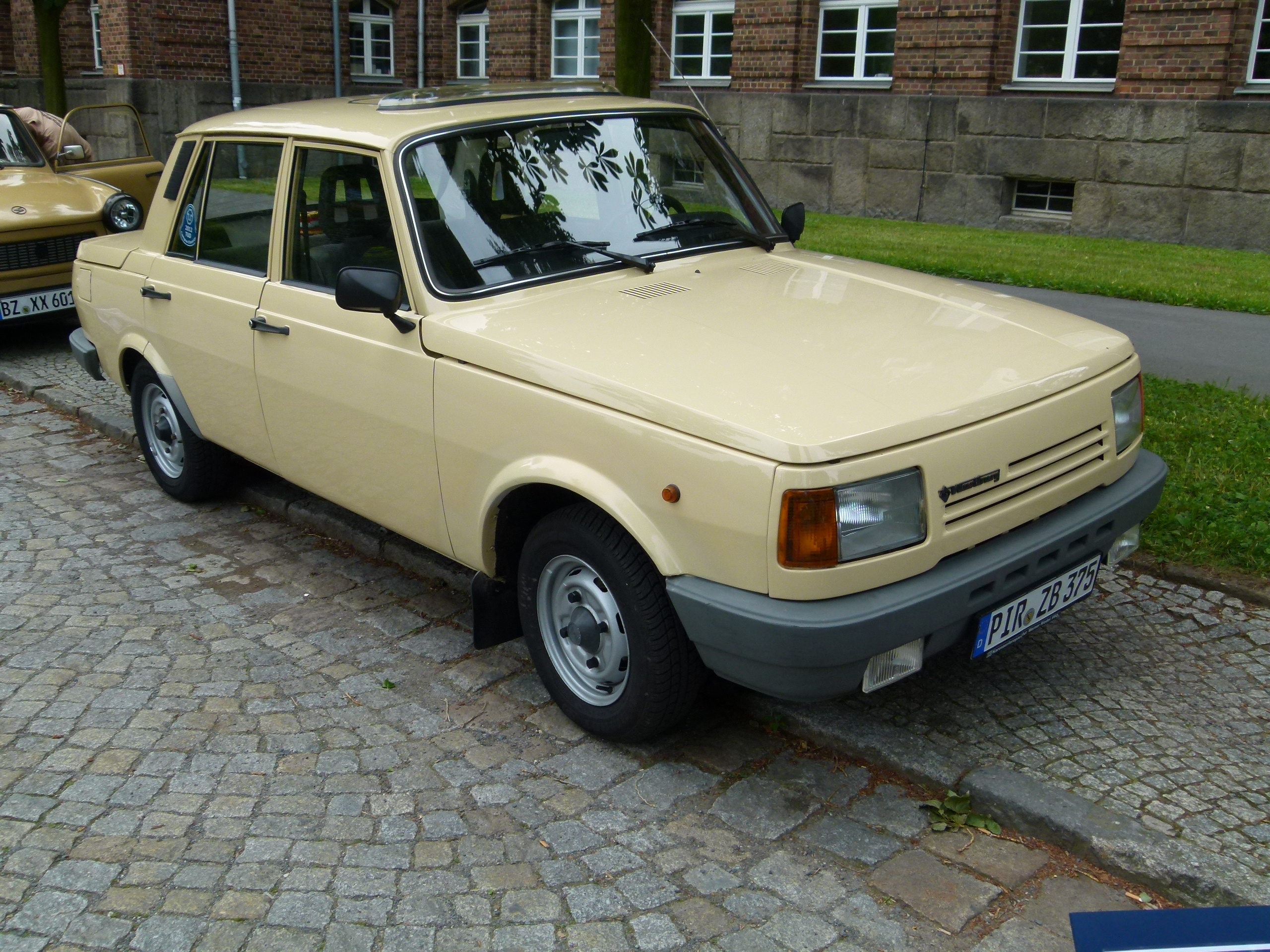 AWE Wartburg Eisenach, 1990, (1. TUD Campus Classics, 9.6.2012, Dresden)